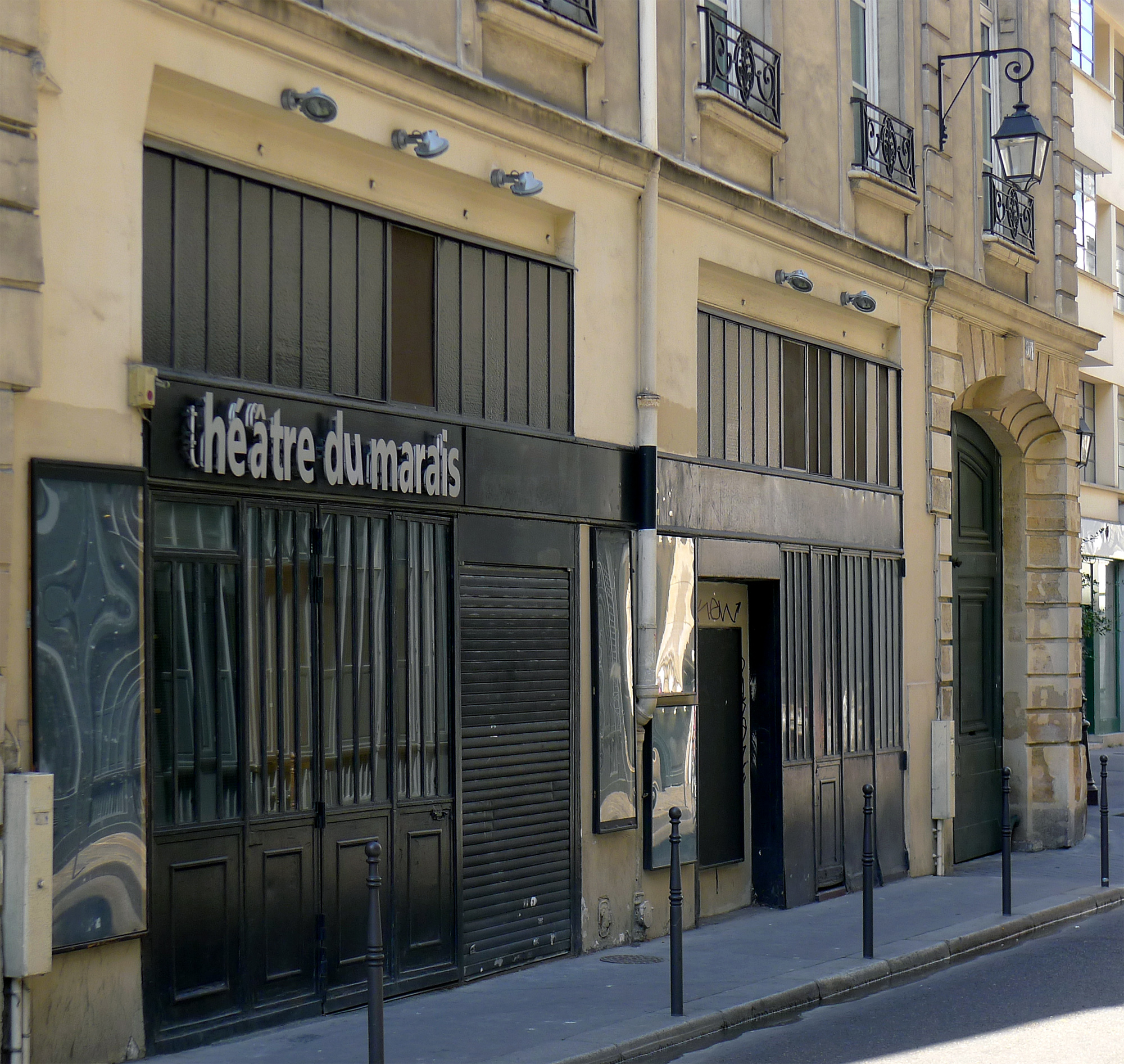 Immeuble (Inscrit)actuellement en 2013, théâtre du Marais .